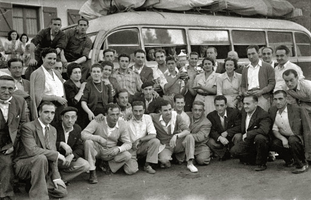 Título original: Recibimiento a los remeros de Ur-Kirolak en San Sebastián (1/8) Localización: San Sebastián (Guipúzcoa)